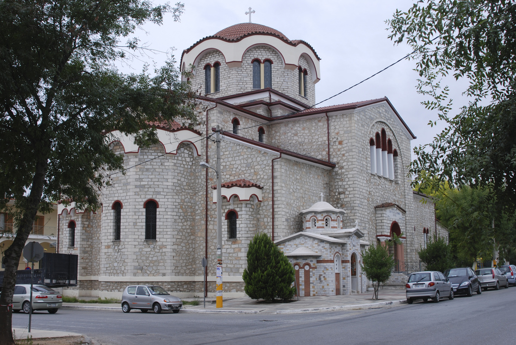 Църквата Свети Пантелеймон в Драма, Гърция.